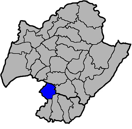 臺灣省台南縣永康市，KJ (talk)繪製。